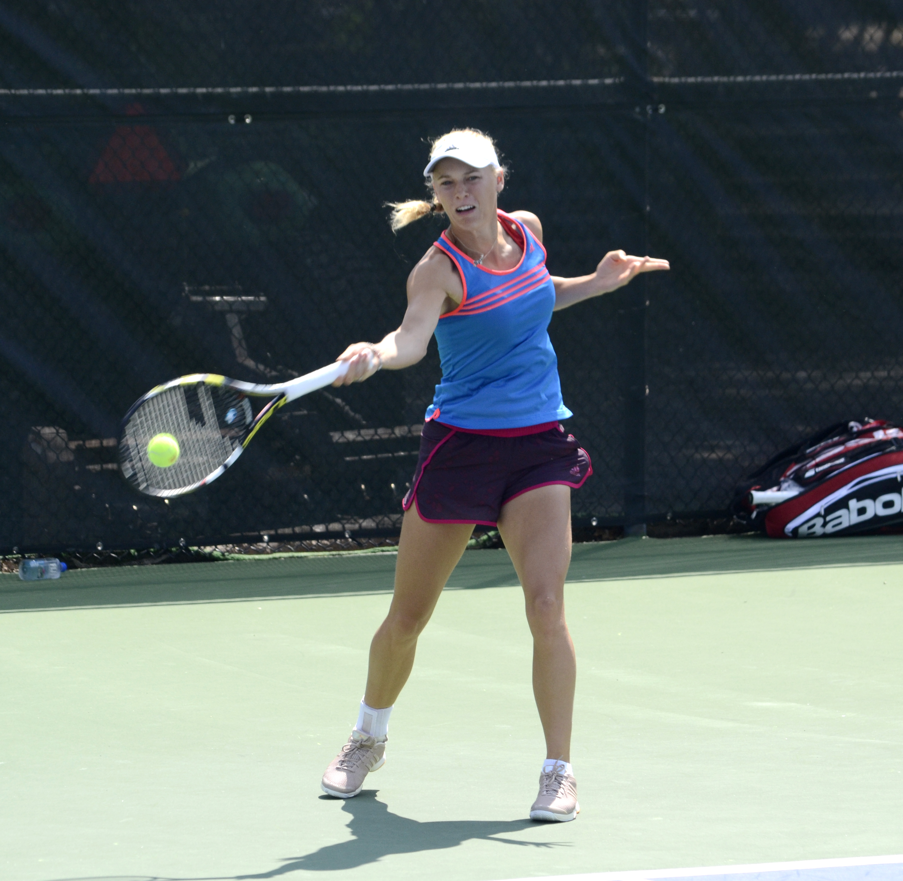 Caroline Wozniacki alla Rogers Cup 2014